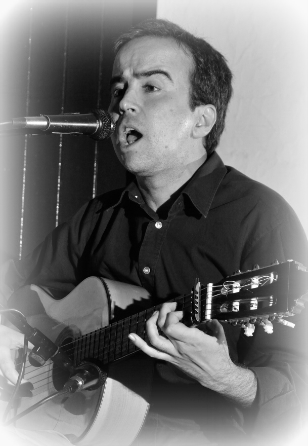 Luis de Manuela